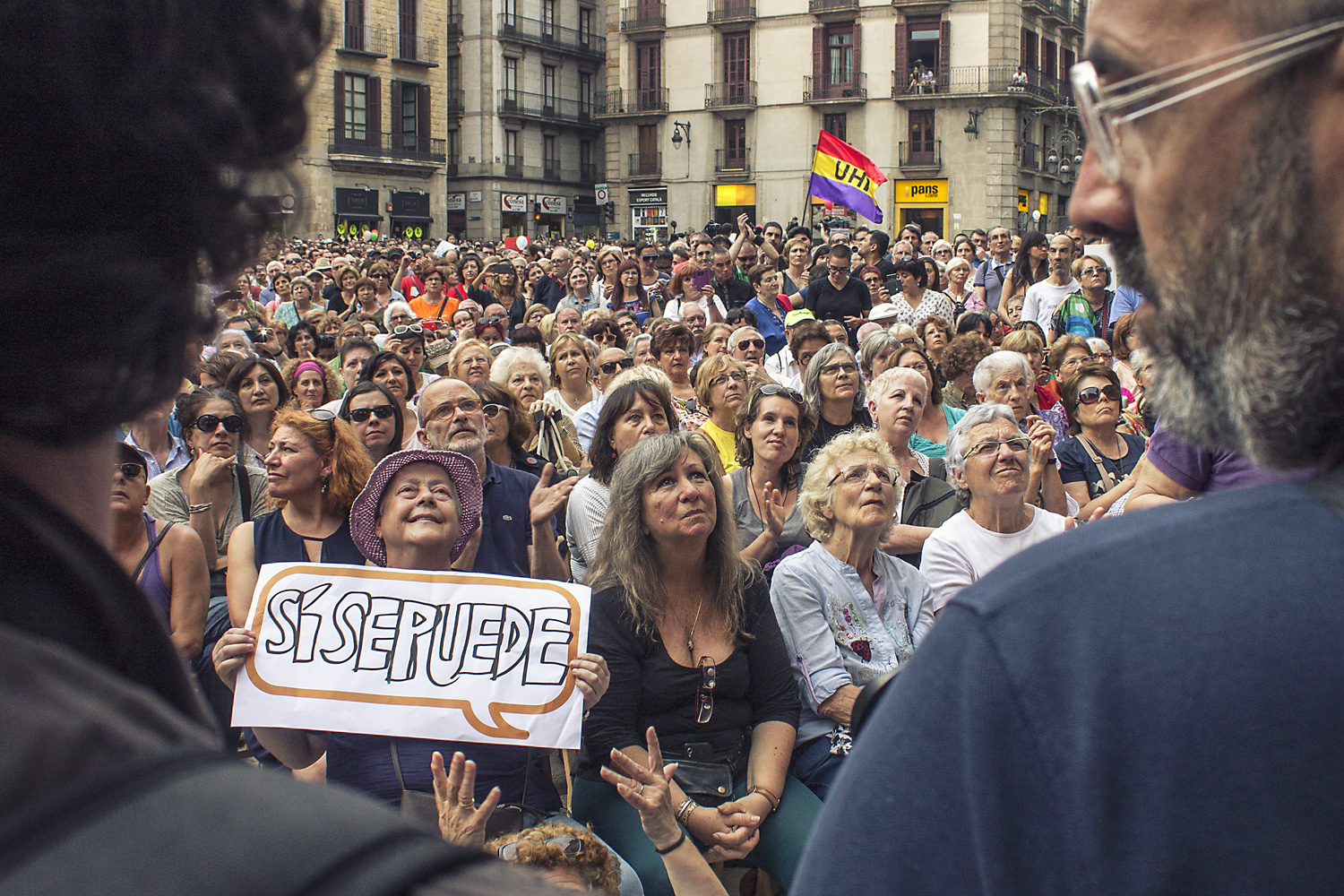 Sí se puede. Plaça Sant Jaume 13/06/2015 Foto: Marc Lozano Investiture of Ada Colau, 14 June 2015, Barcelona